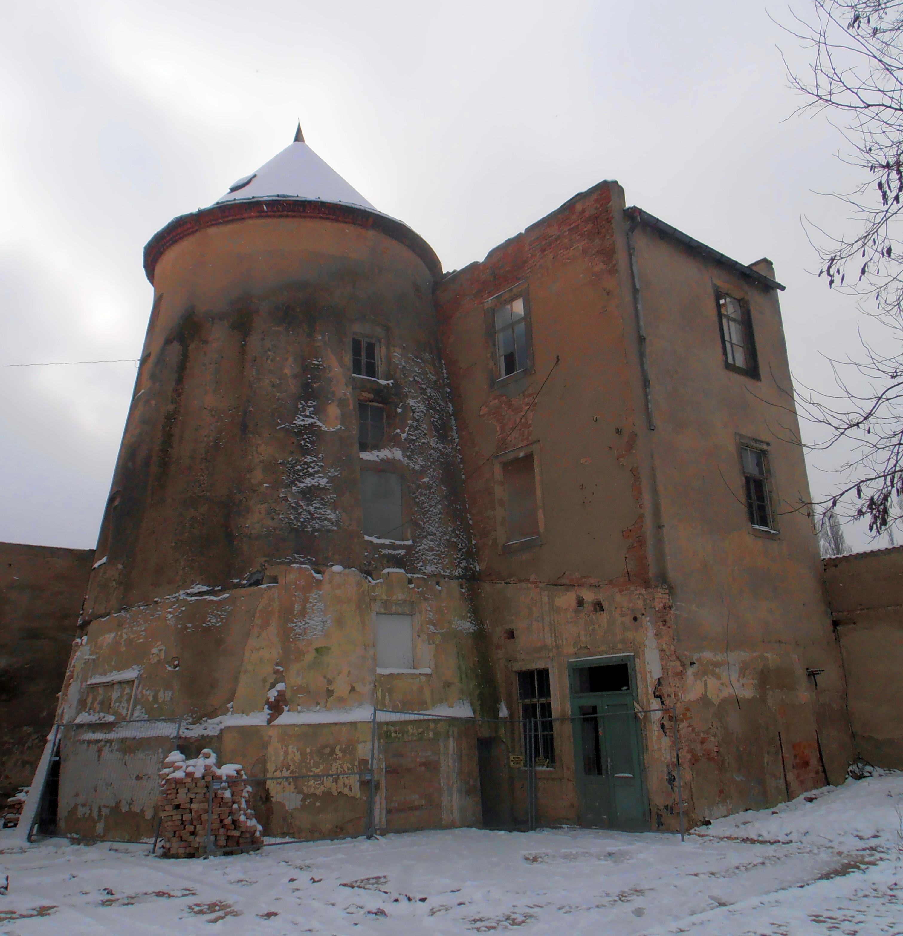 Denkmalgeschützte Turm Holländer-Windmühle in der Kötzschenbroder Straße 9 in Dresden-Mickten; Blick von N